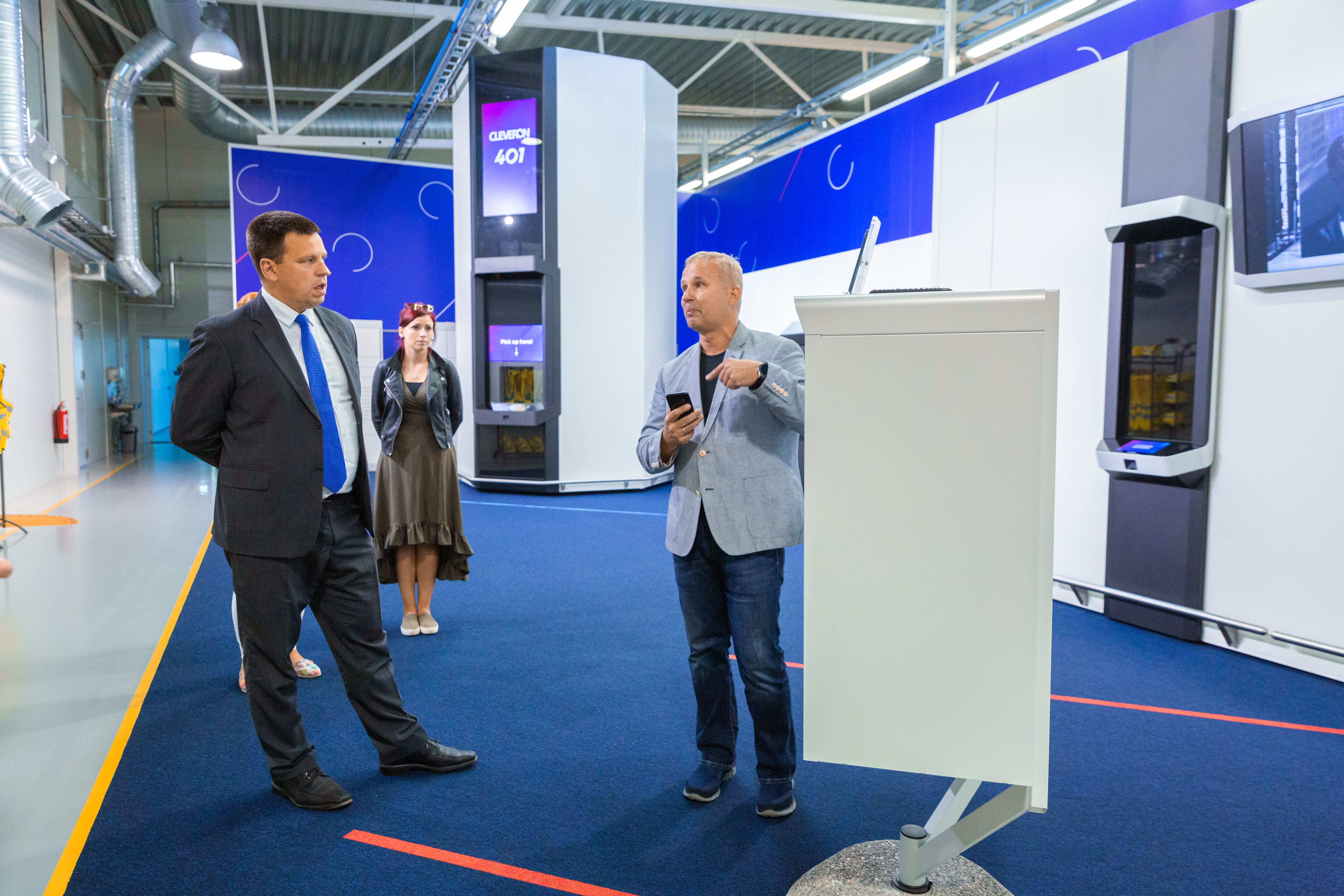 Eesti Vabariigi peaminister külastamas Cleveroni